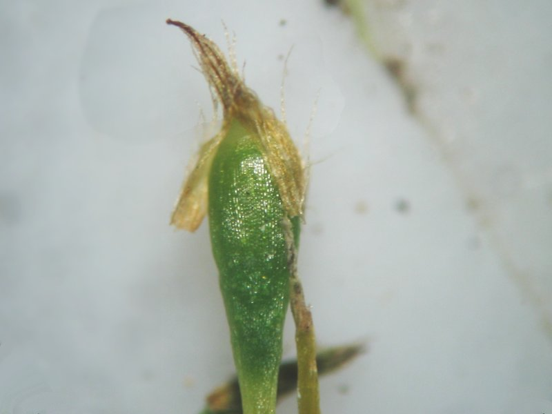 Kapsel von Bruchs Krausblattmoos Ulota bruchii, Müritz-Gebiet